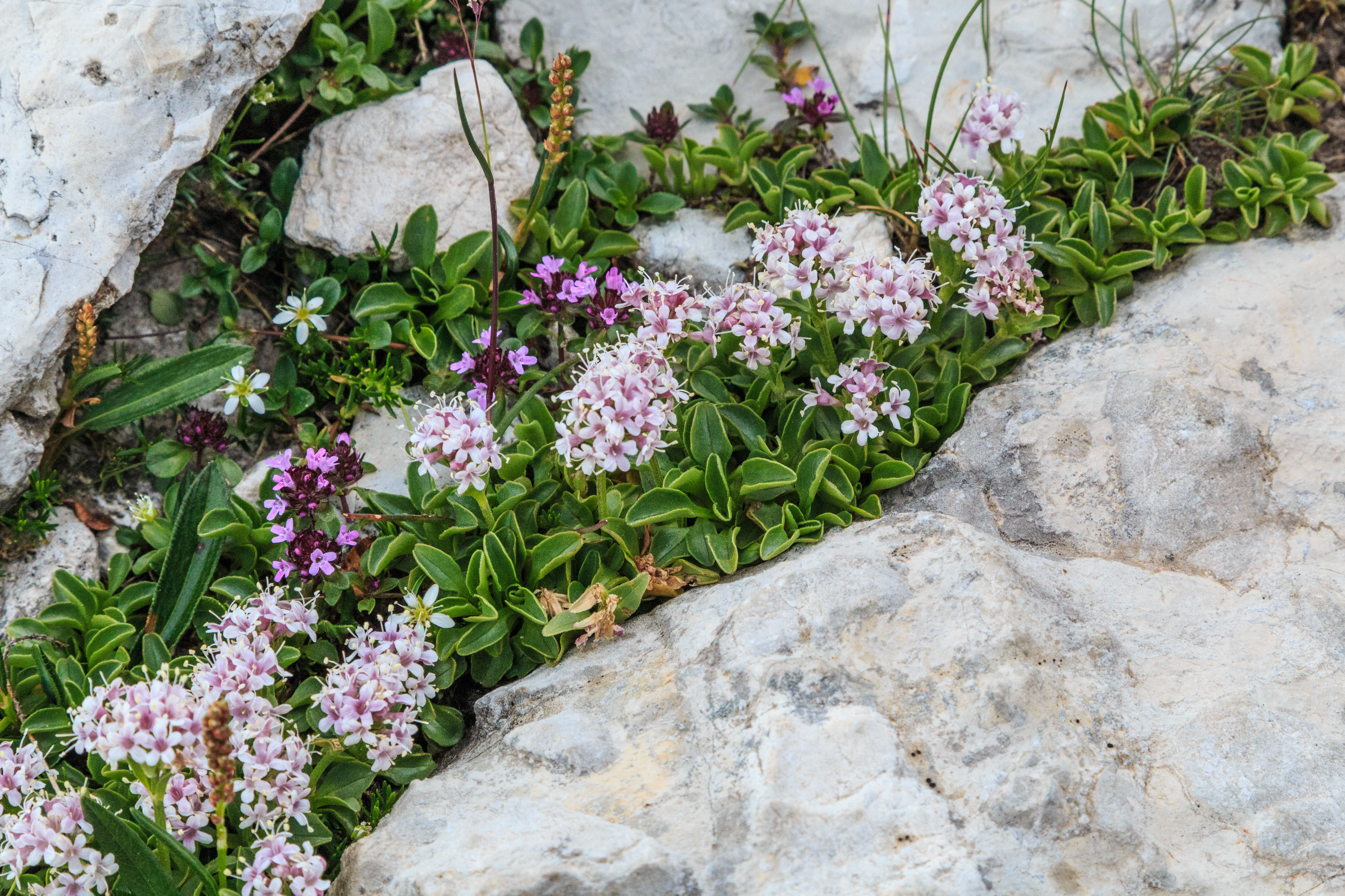 kozlík rozkladitý z Vallon peaks Sella